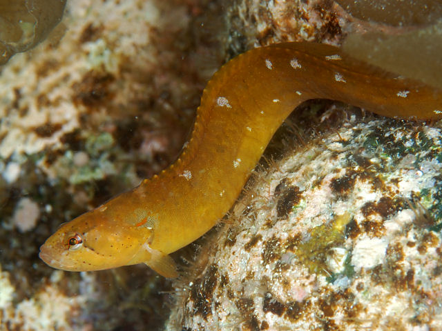 ベニツケギンポ Dictyosoma rubrimaculatum